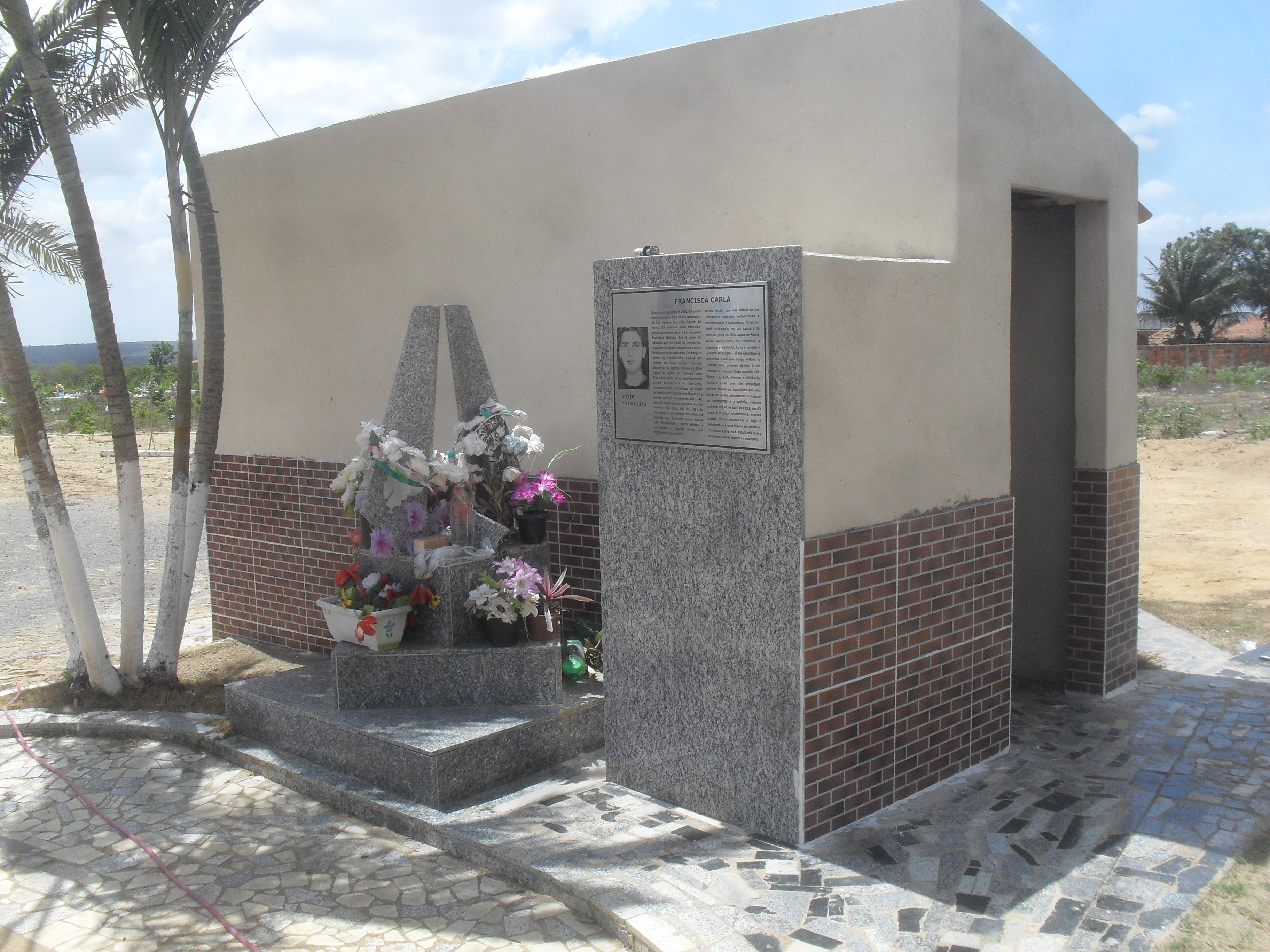 Campo Santo Francisca Carla(Tianguá CE), local onde estão enterrados os restos mortais de Francisca Carla.